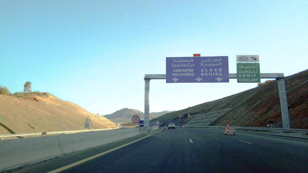 pénétrante de Bejaia près d'Ahnif